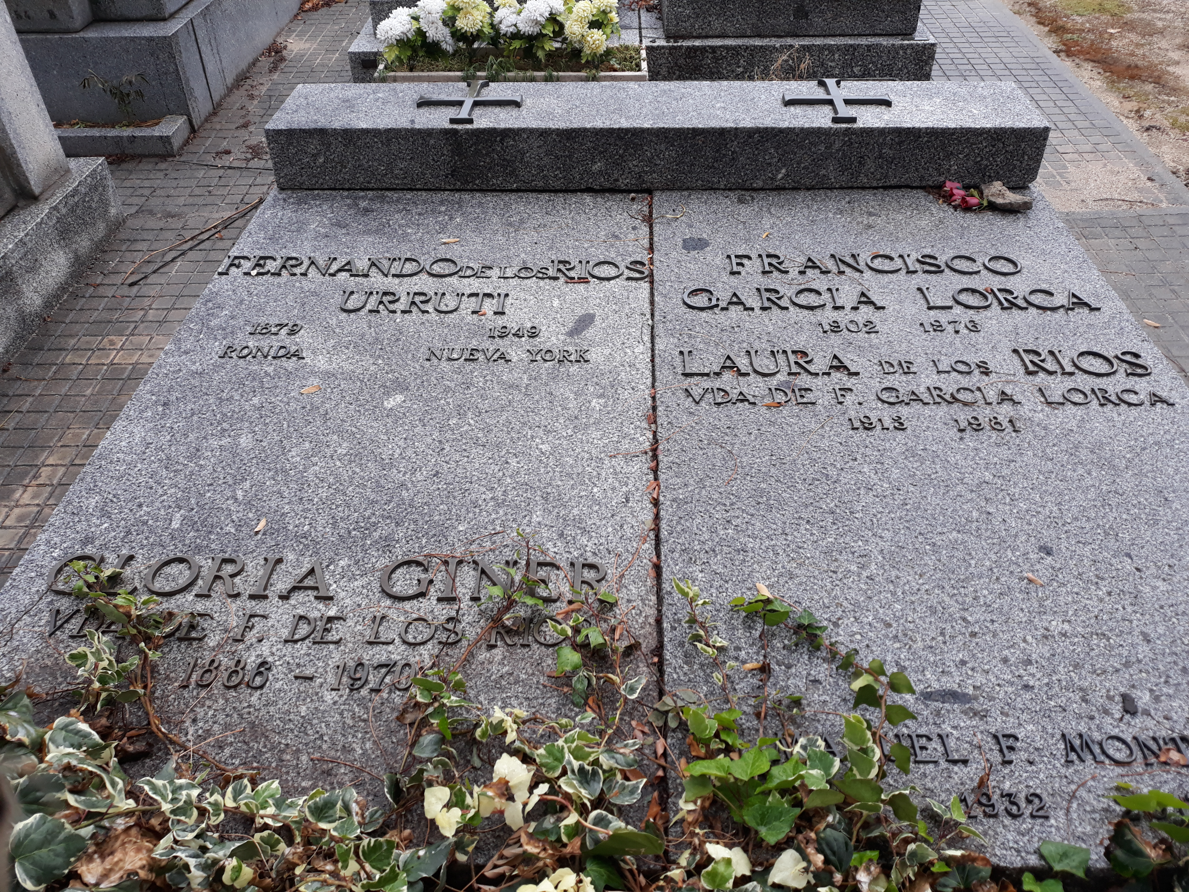 Das Grab des spanischen Schriftstellers Francisco Garcia Lorca auf dem Cementerio civil de Madrid.